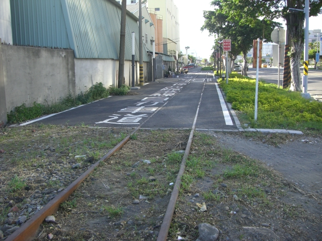 西臨港自行車道起點